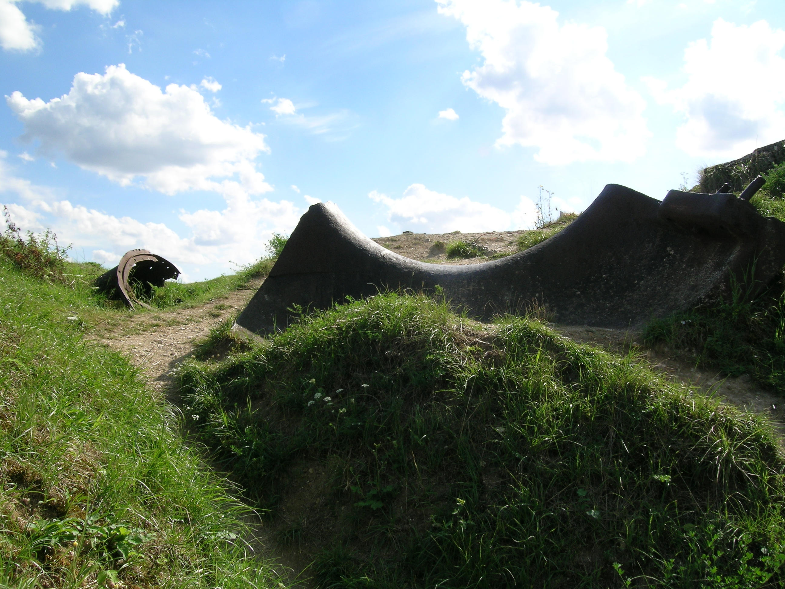 Restes déchiquetés de la tourelle de 75 mm du l'fort de Vaux.